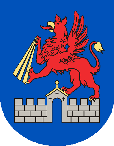 Das Wappen der Hansestadt Anklam zeigt auf blauem Grund eine silberne, gezinnte Mauer, in der Mitte ein offenes Torhaus mit goldenem Dach und Knauf, auf der Mauer ein halbaufgerichteter Greif mit goldener Bewehrung, ausgeschlagener roter Zunge und aufgeworfenem Schweif mit goldener Schwanzquaste, in den Vorderklauen einen goldenen Dreistrahl haltend.